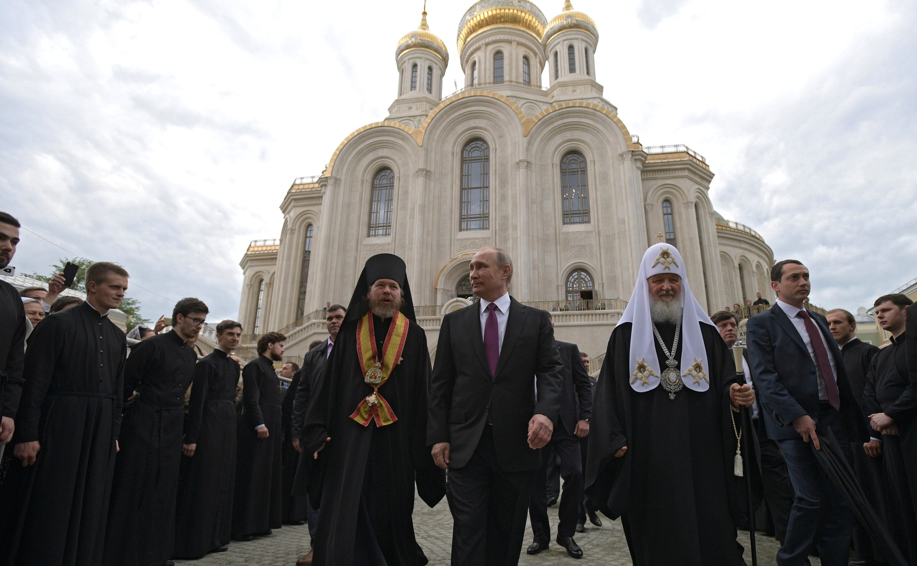 В ходе посещения Владимиром Путиным московского Сретенского монастыря